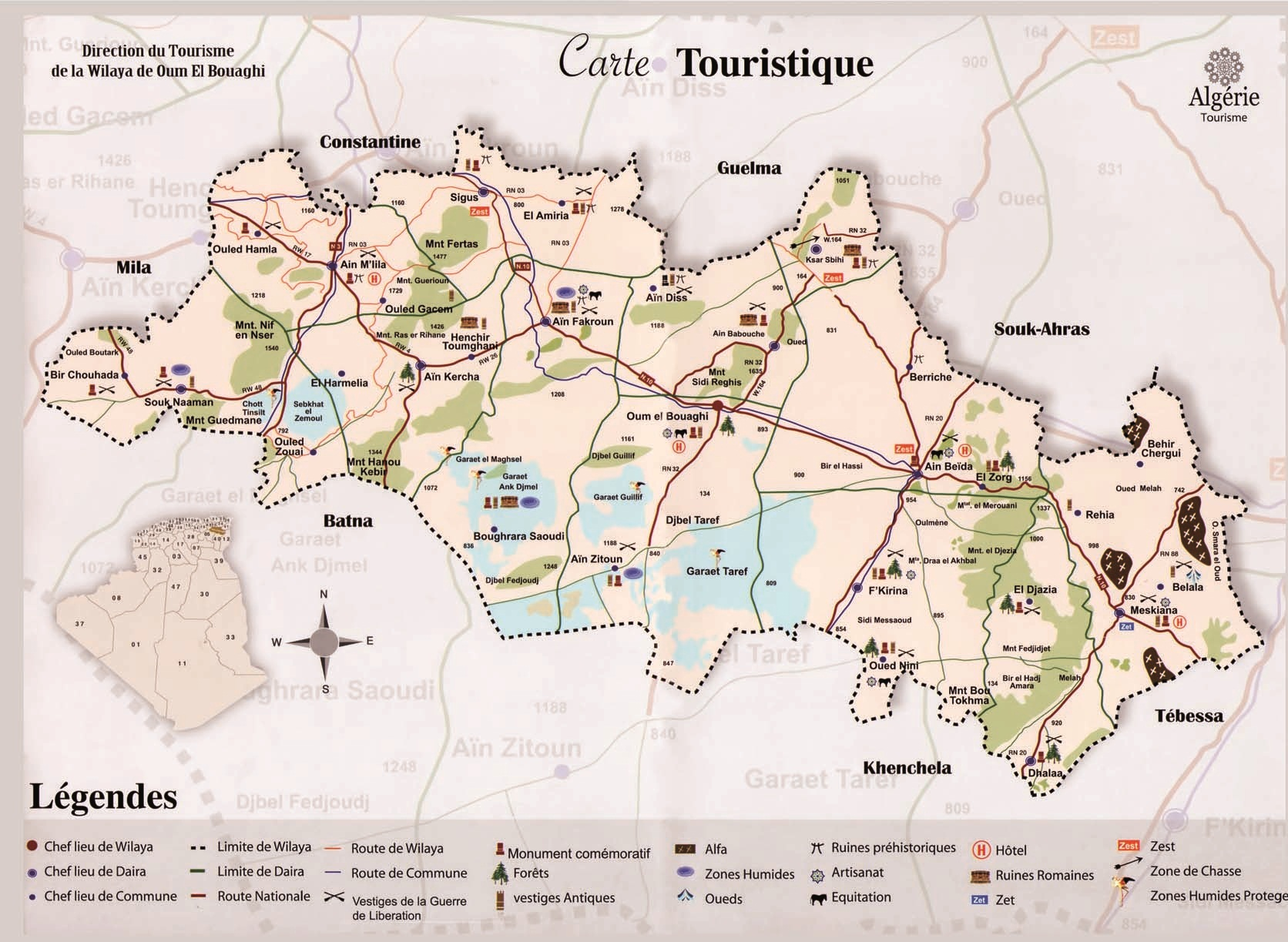 Carte touristique de la wilaya d'Oum El Bouaghi